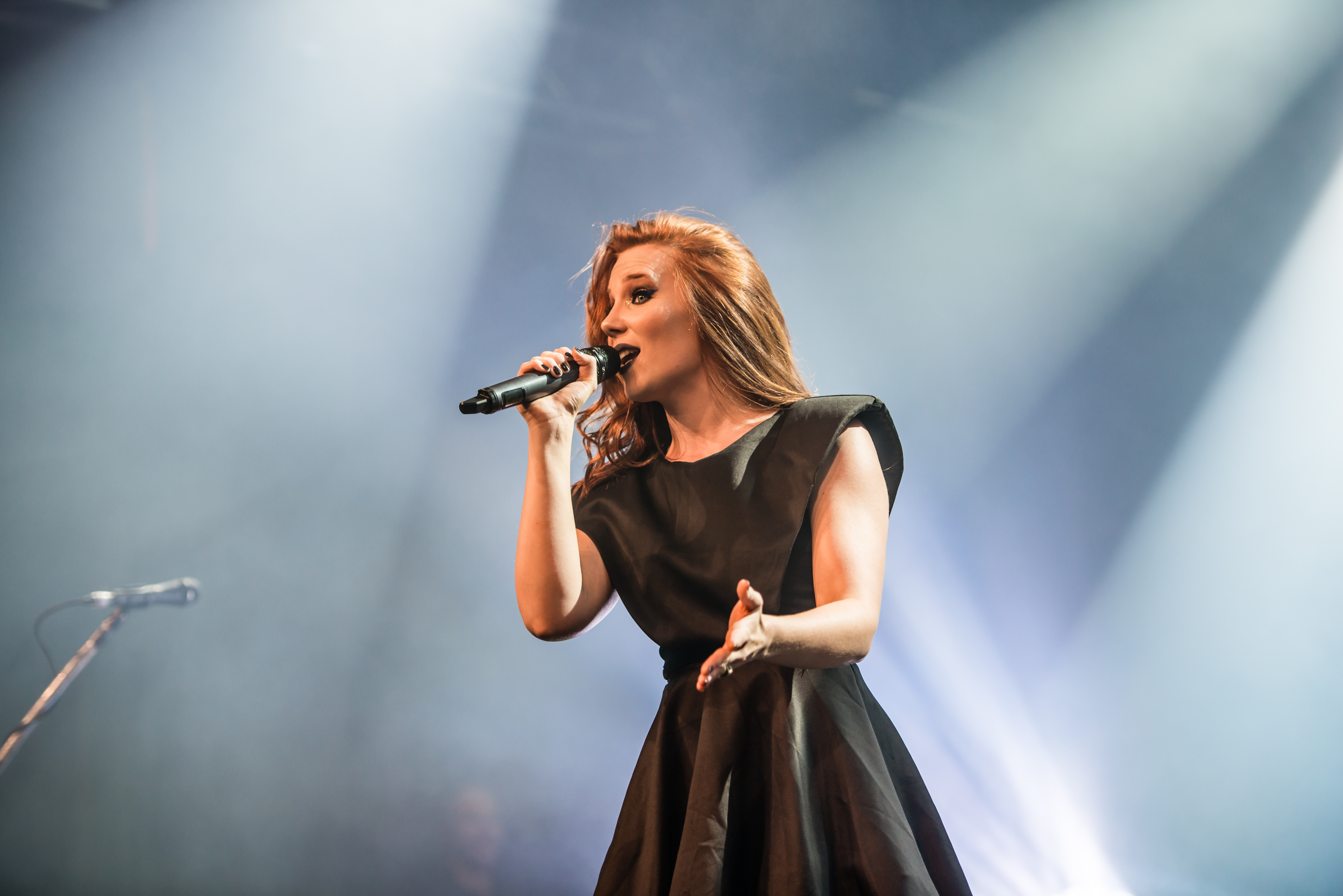 'Epica - Epic Metal Fest - Eindhoven'